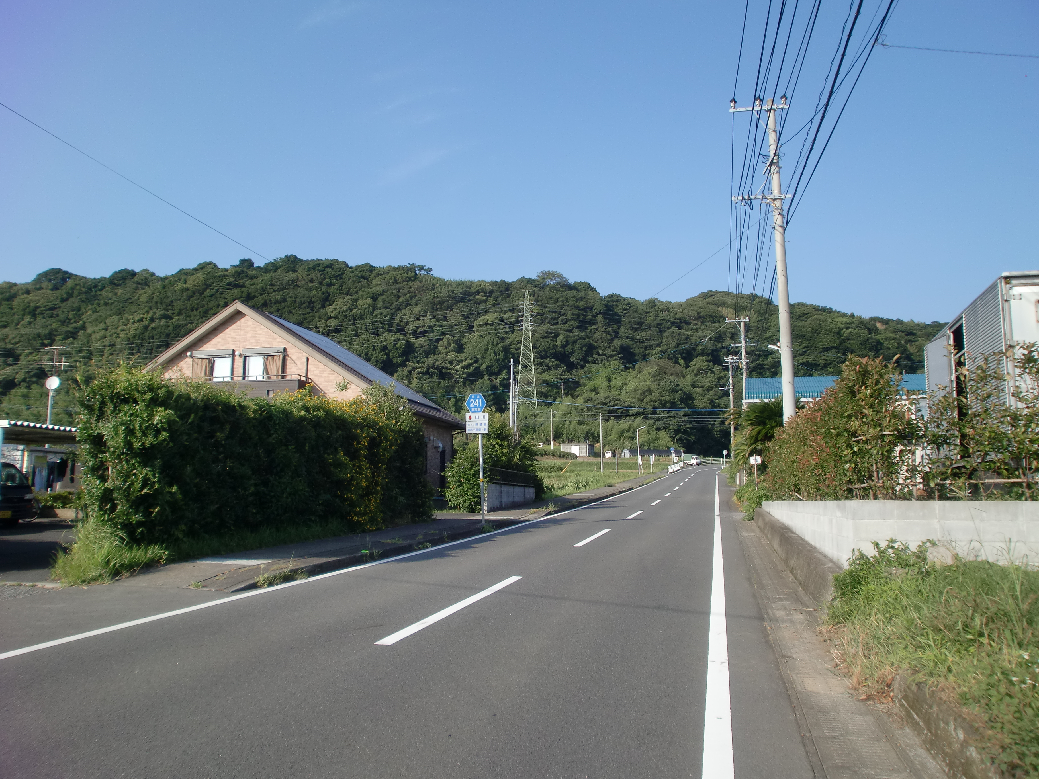 鹿児島県道241号大山開聞線を開聞上野から起点方面を望む